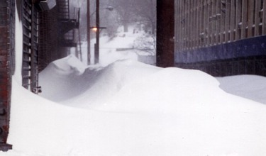 Hófúvás képe egy amerikai településen